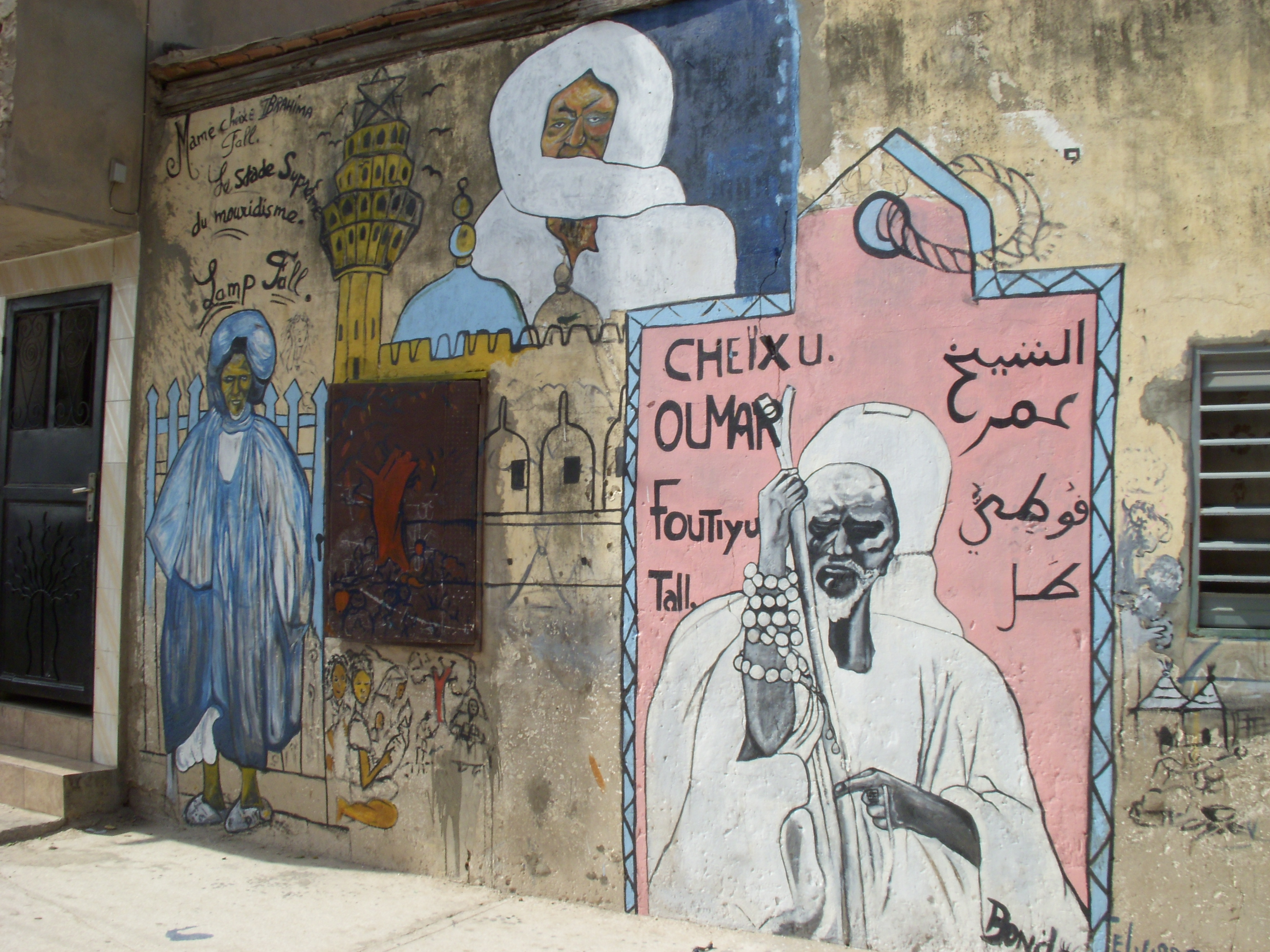 Cheikh Oumar Foutiyu Tall (fresque à Dakar, Sénégal)